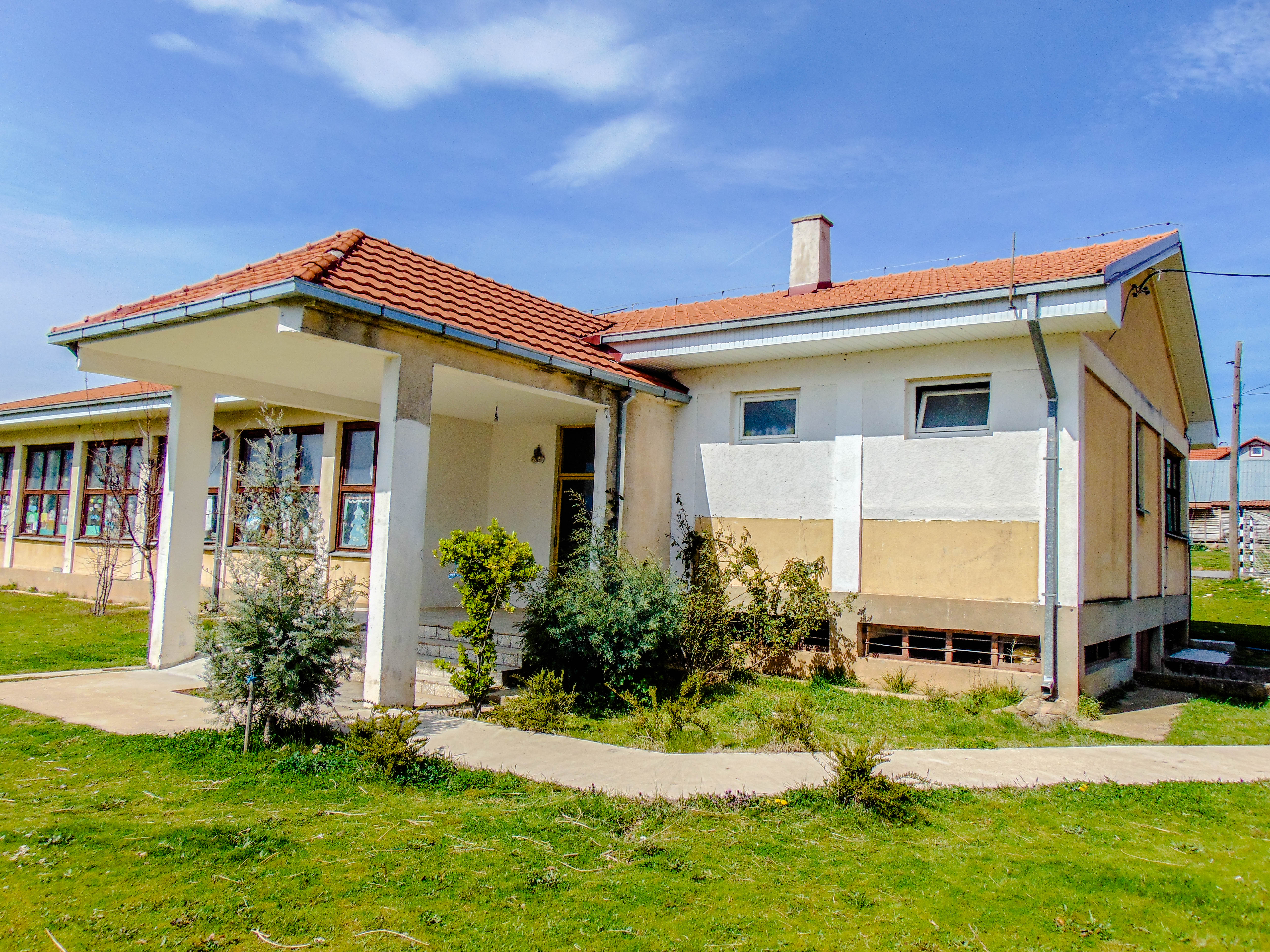 ОУ „Мануш Турновски“ - Самоилово